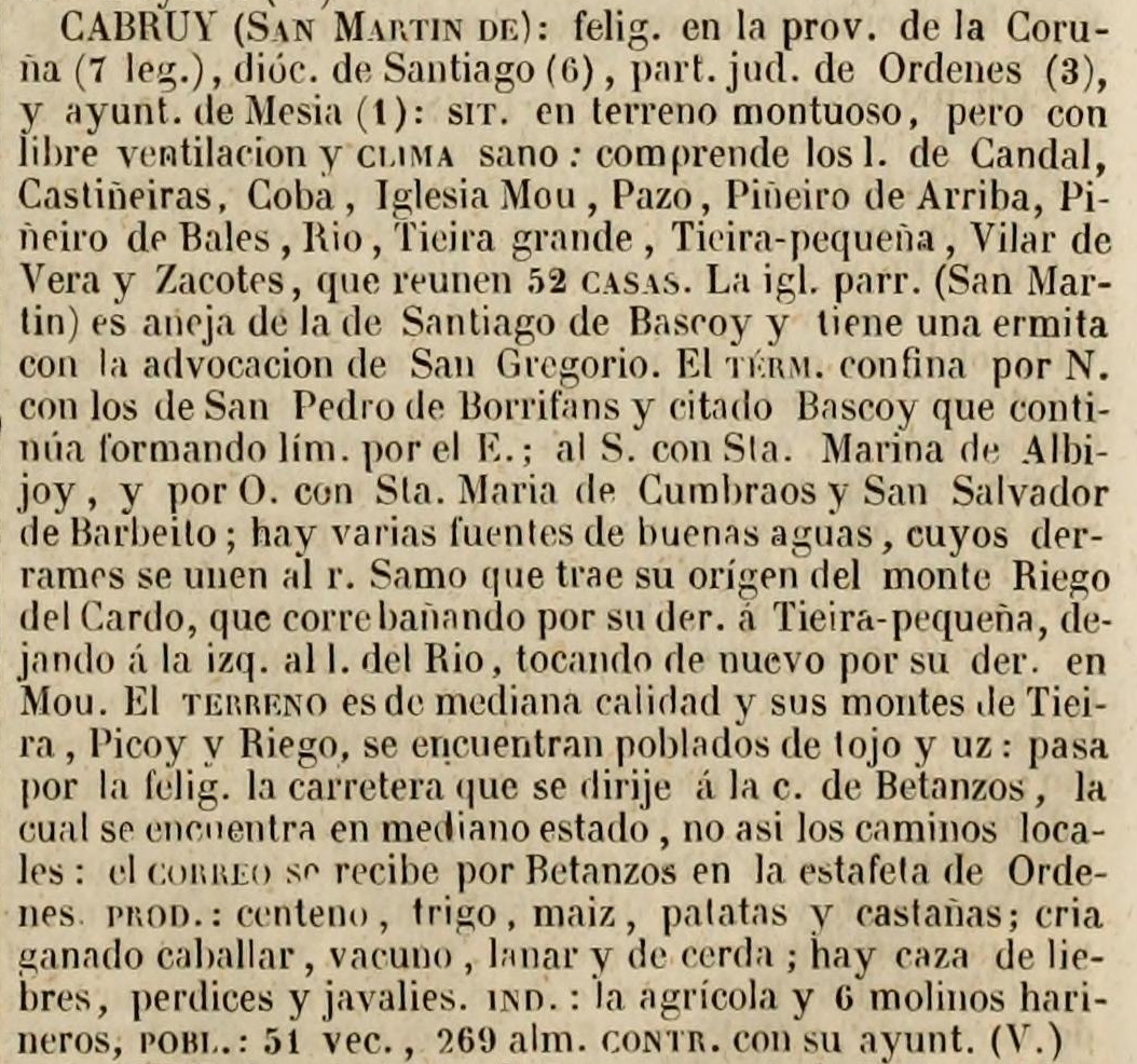 Cabrui no Diccionario geográfico-estadístico-histórico de España y sus posesiones de Ultramar.